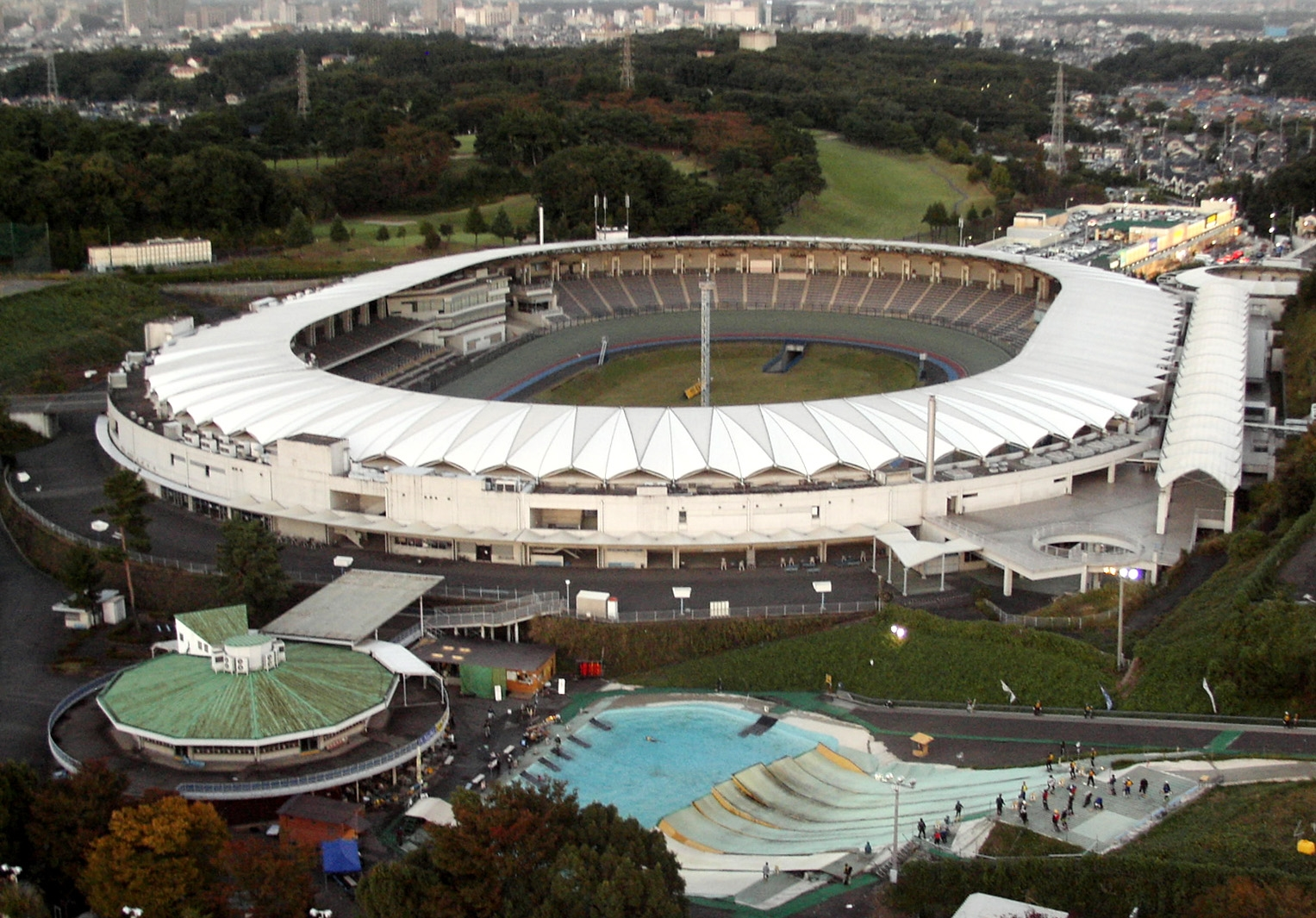 西武園競輪場 外観画像 場所: 西武園ゆうえんち・アトラクション ジャイロタワー80m地点